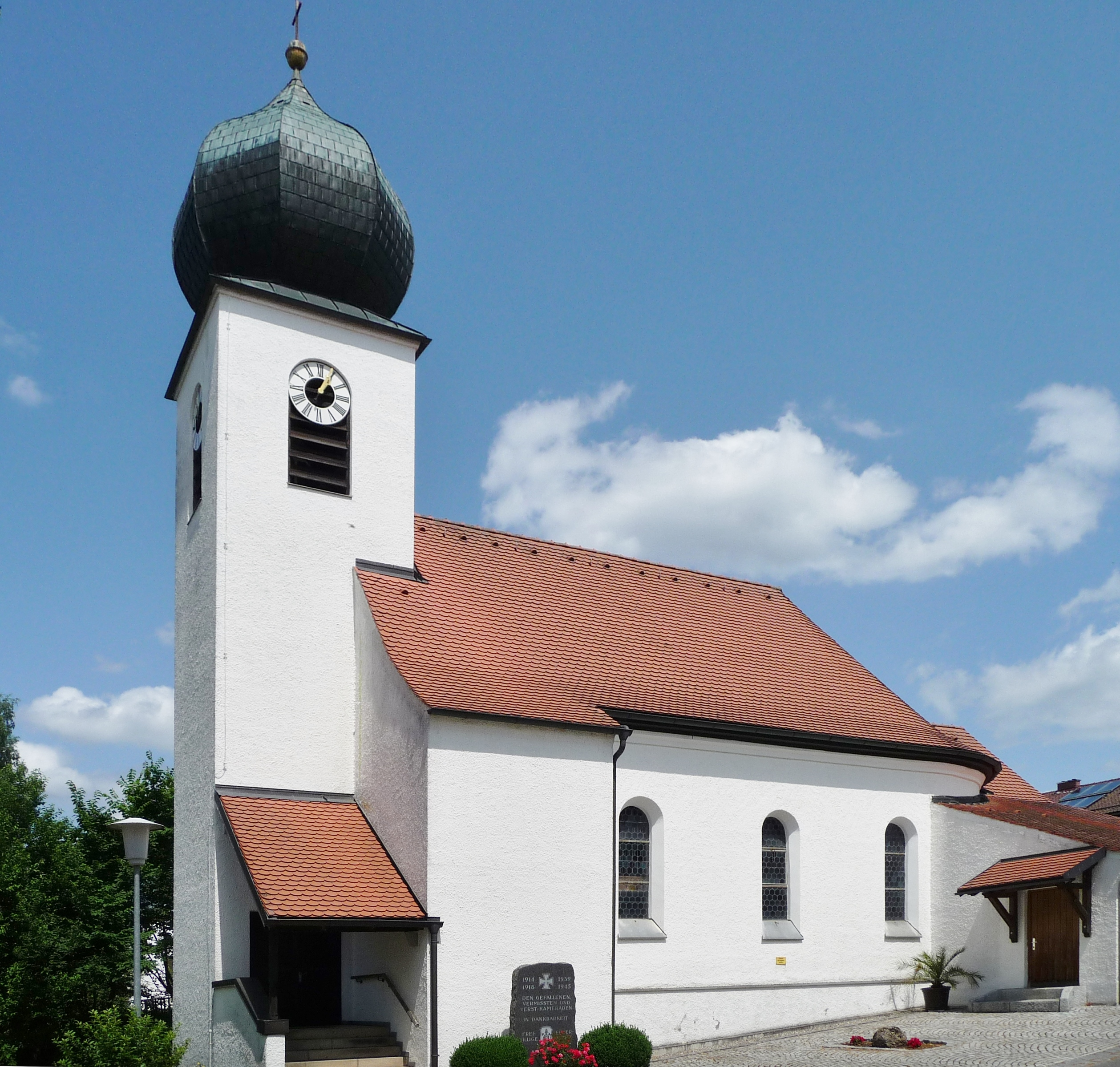 Die Filialkirche Herz Jesu in Oberauerkiel